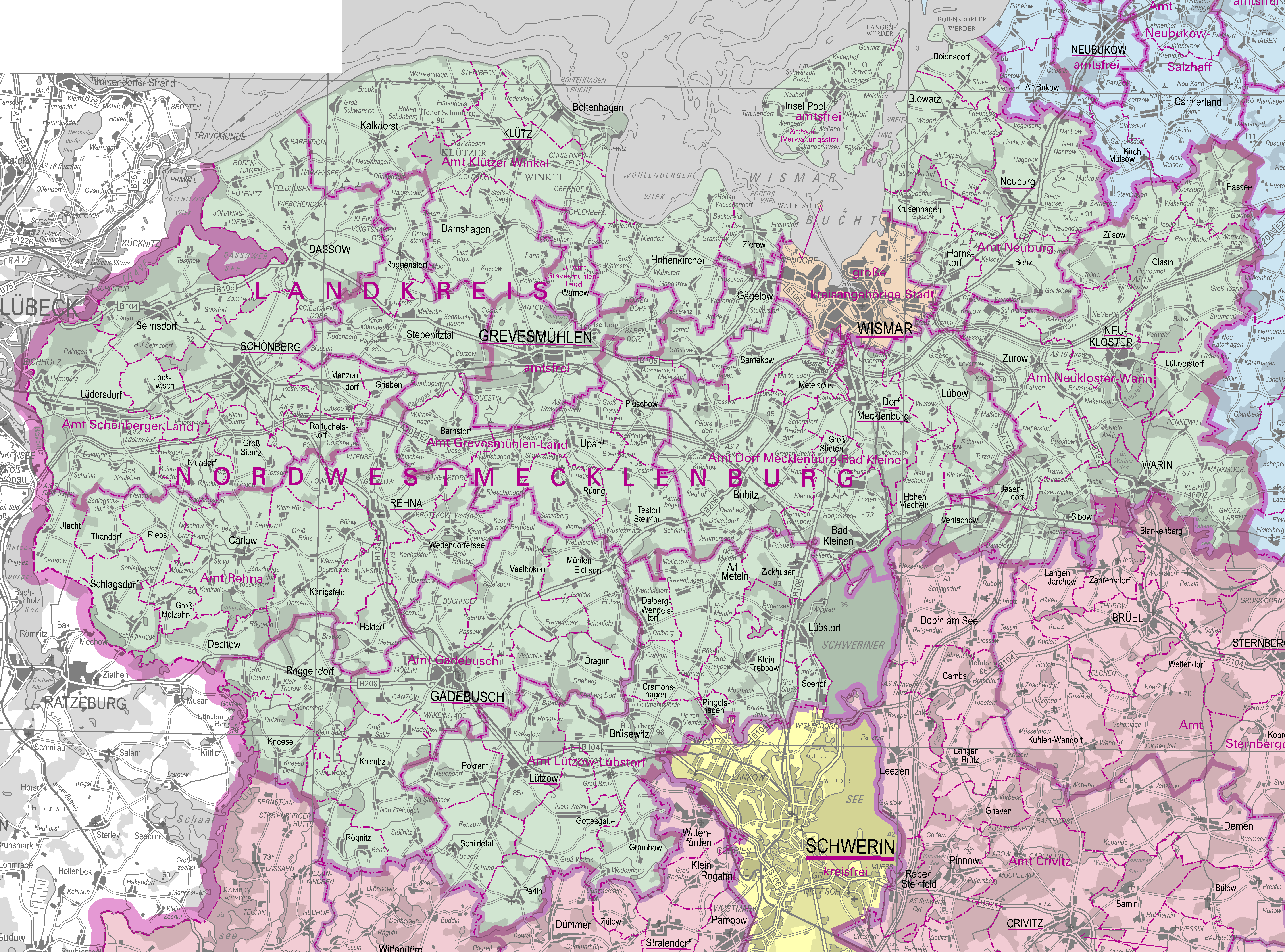 Administrative Karte des Landkreises Nordwestmecklenburg 1:250.000, Stand 1. April 2015